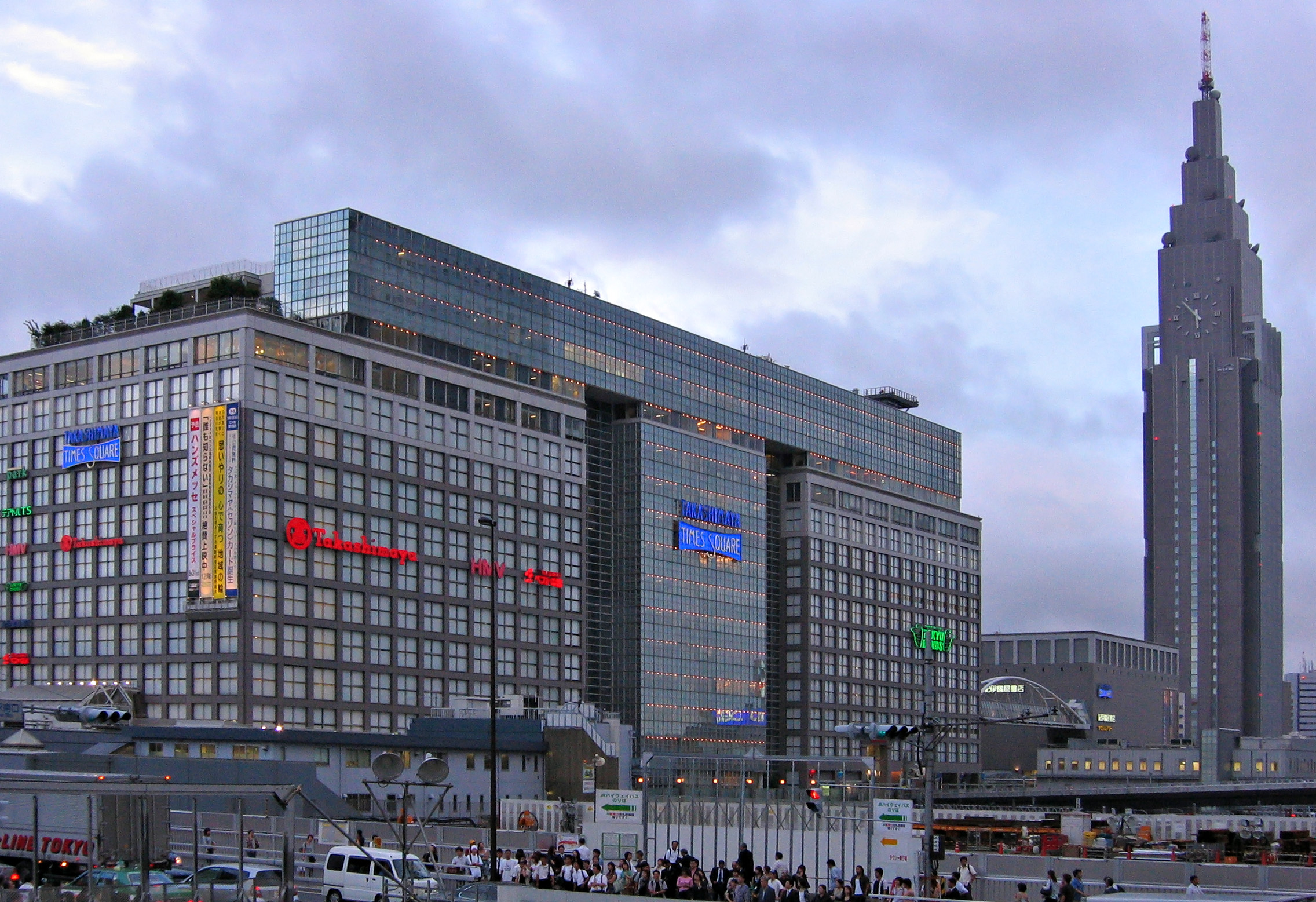 Takashimaya Times Square department store (next to Shinjuku station), Shibuya, Tokyo